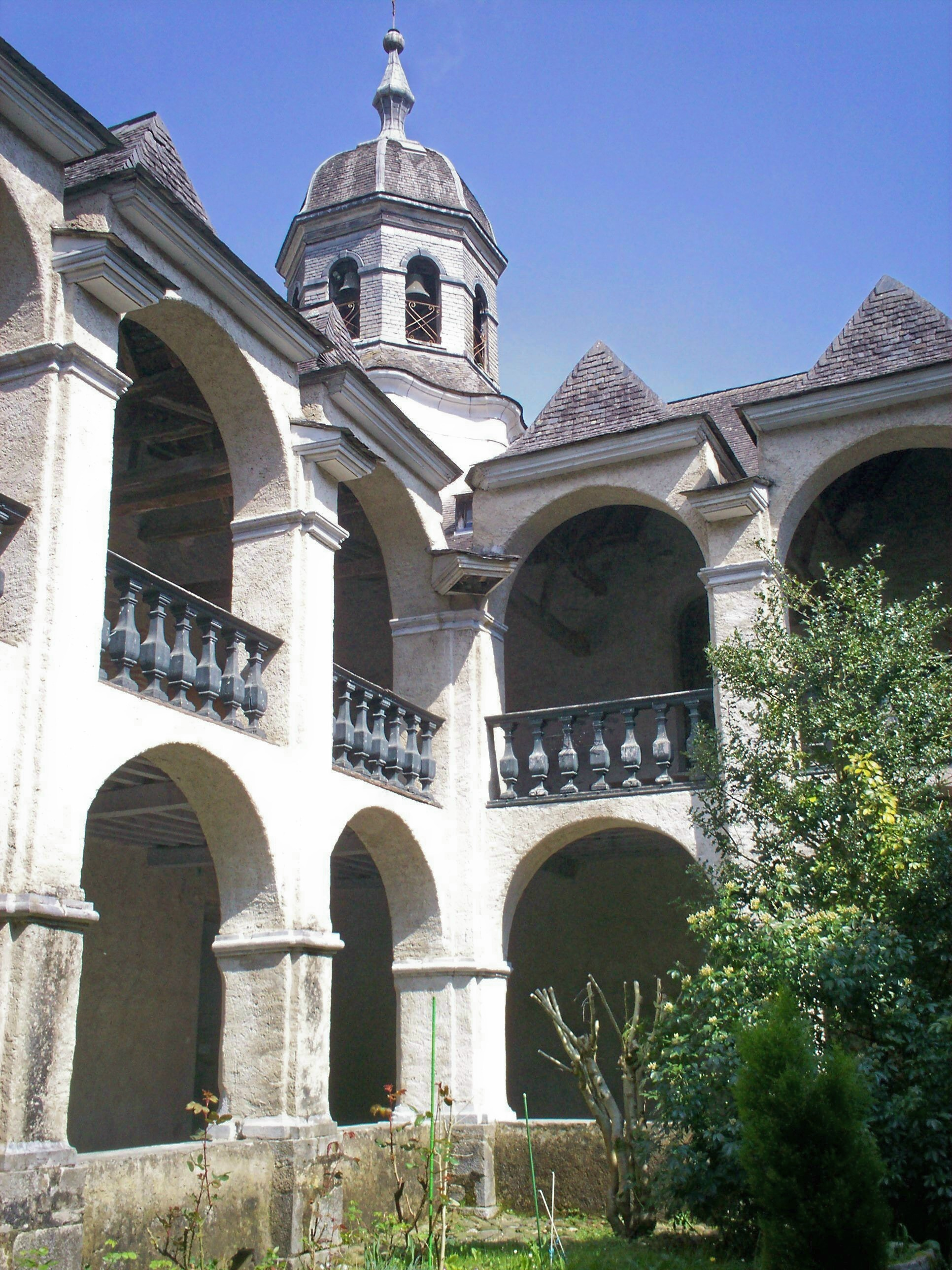 Claustre.